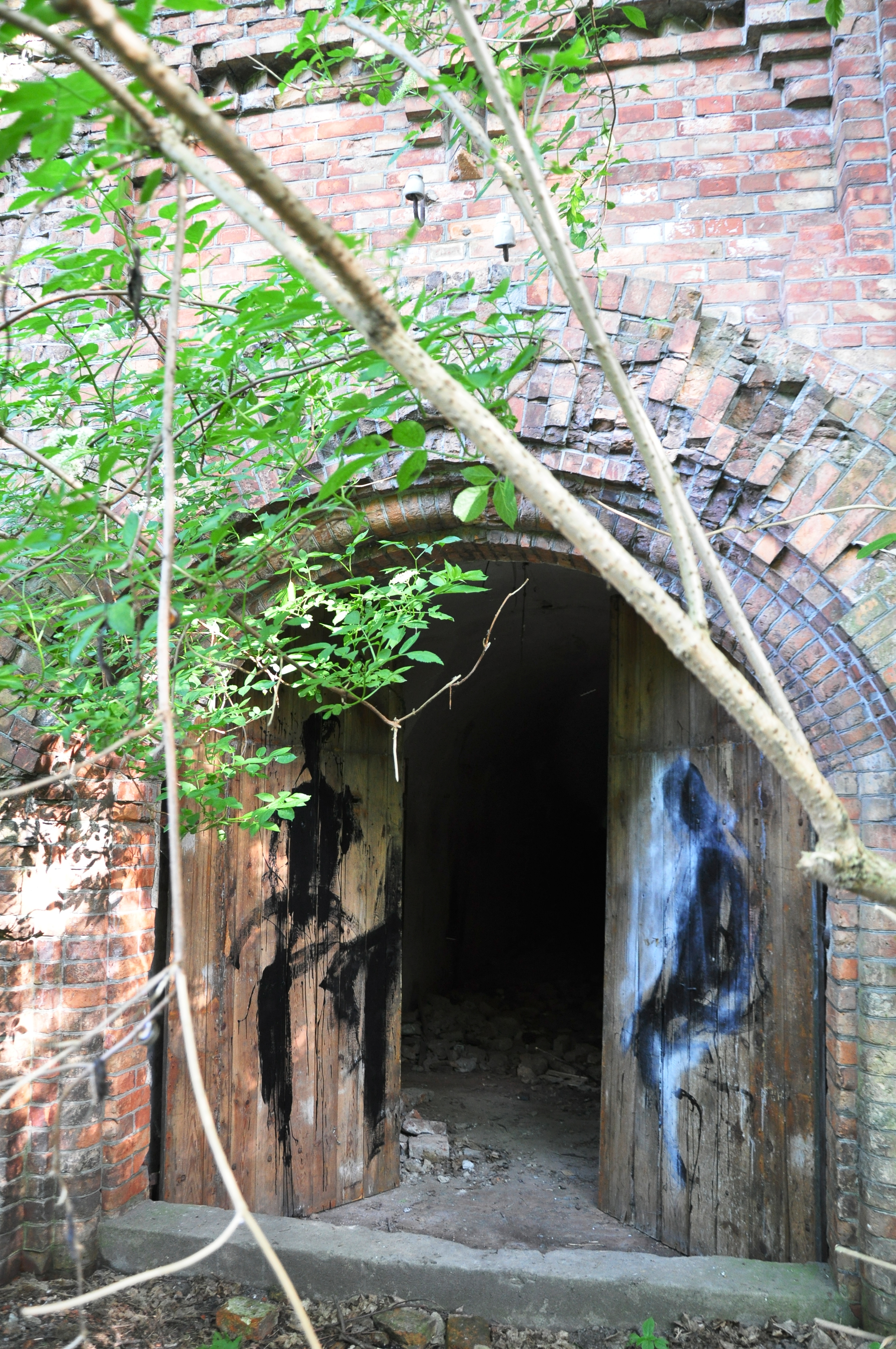 Fort Tsche Pilsudskiego Warschau